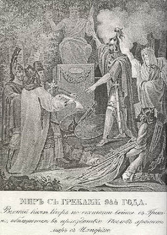 Мир с греками